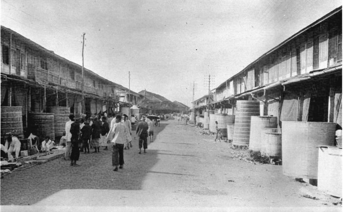 Foto. Straatgezicht met watertonnen